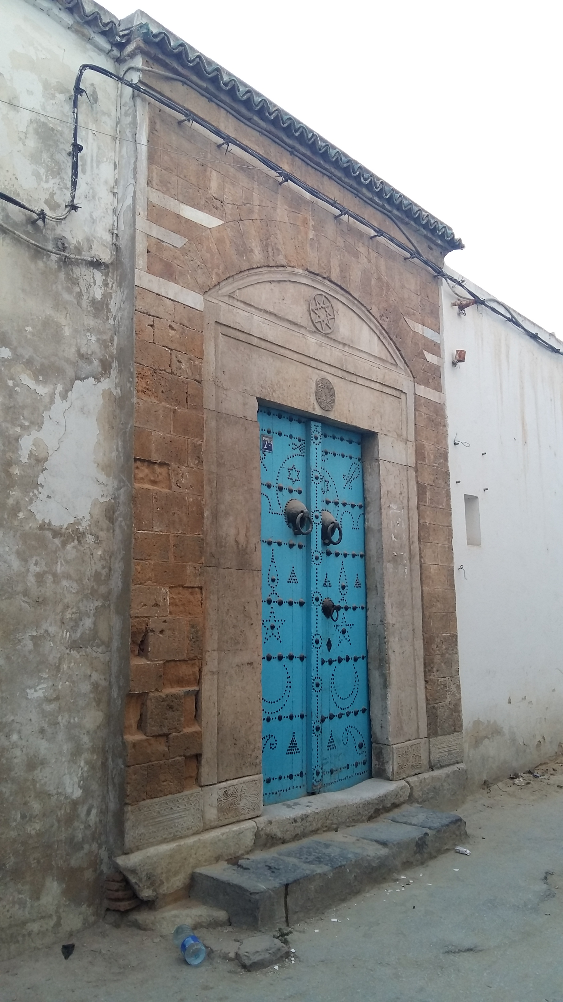 Zaouïa Sidi-Ali-Azzouz